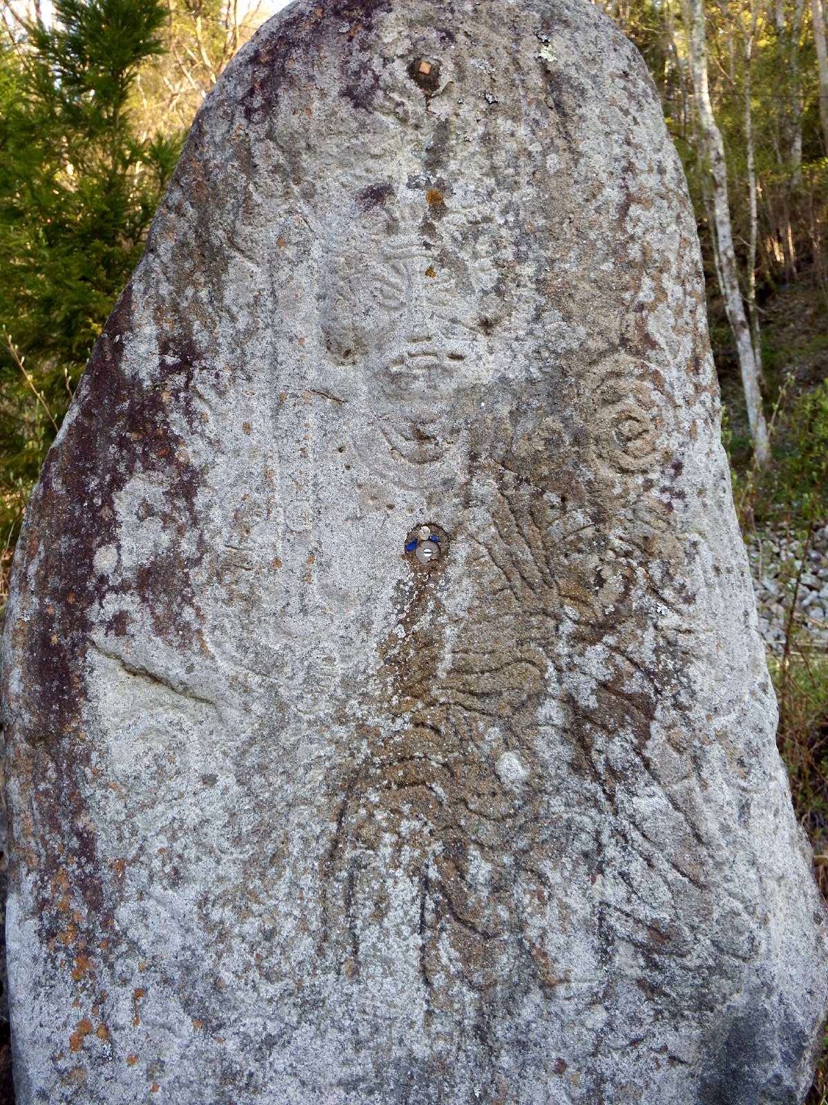 大瀧寺の石画